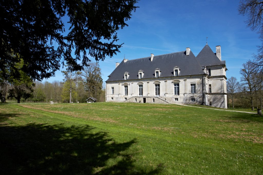 Château de Nuits, façade occidentale